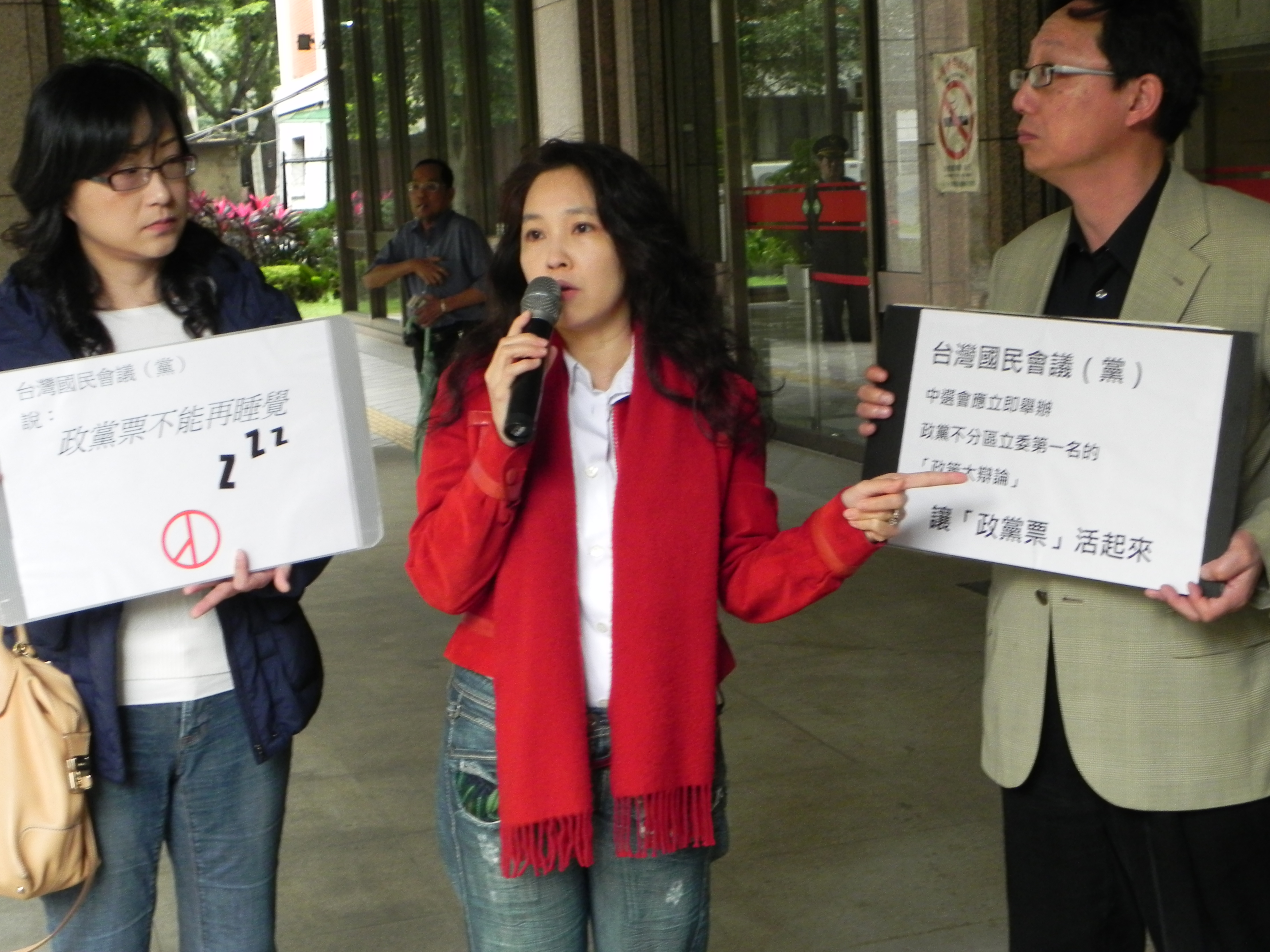 20111208 到中選會要求「政黨票要辯論」